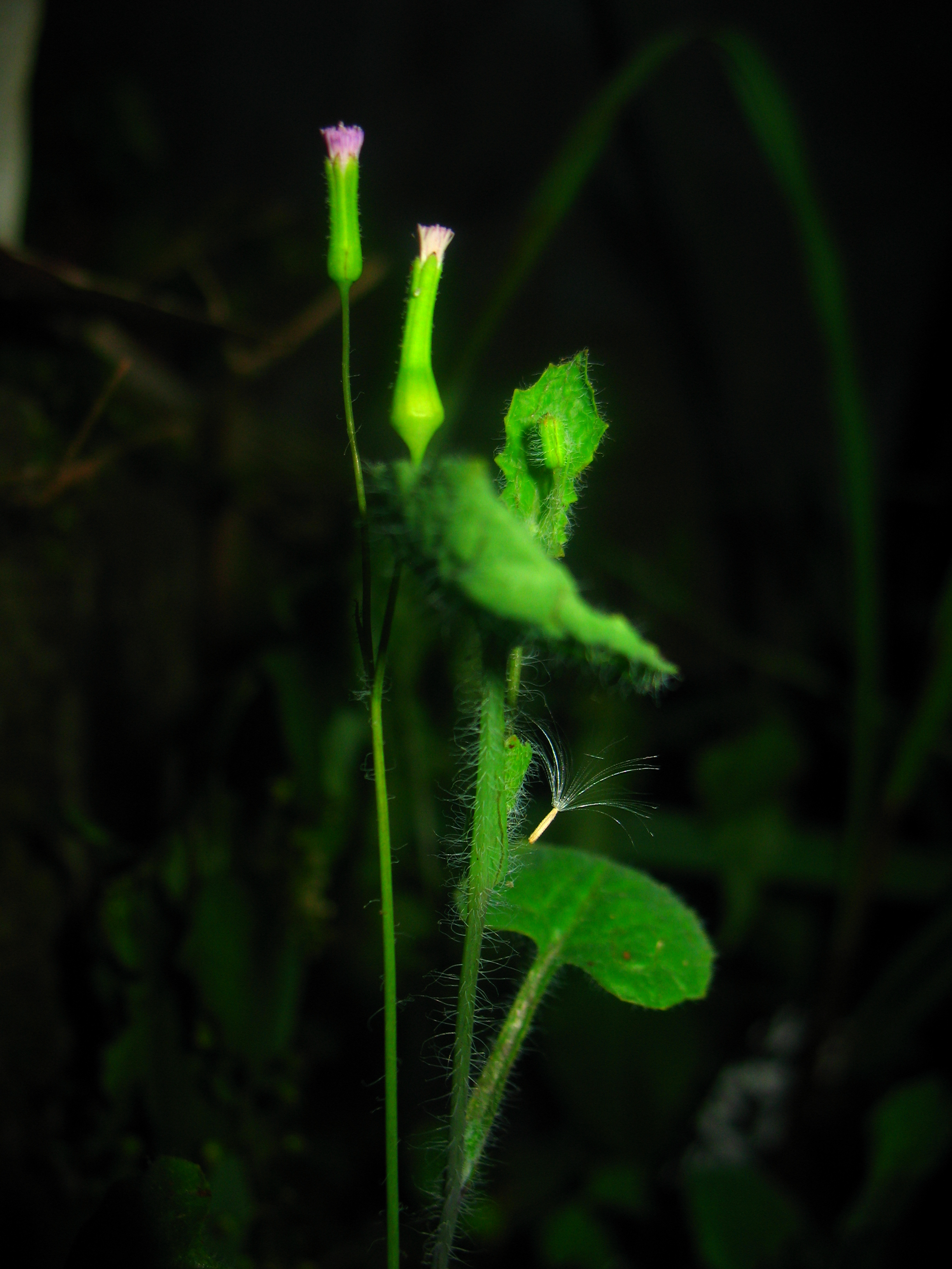 മുയൽ ചെവിയൻ ഒരു രാത്രിദൃശ്യം. ഇലകൾ, തണ്ട്, മൊട്ട്, വിത്ത് എന്നിവയും കാണാം